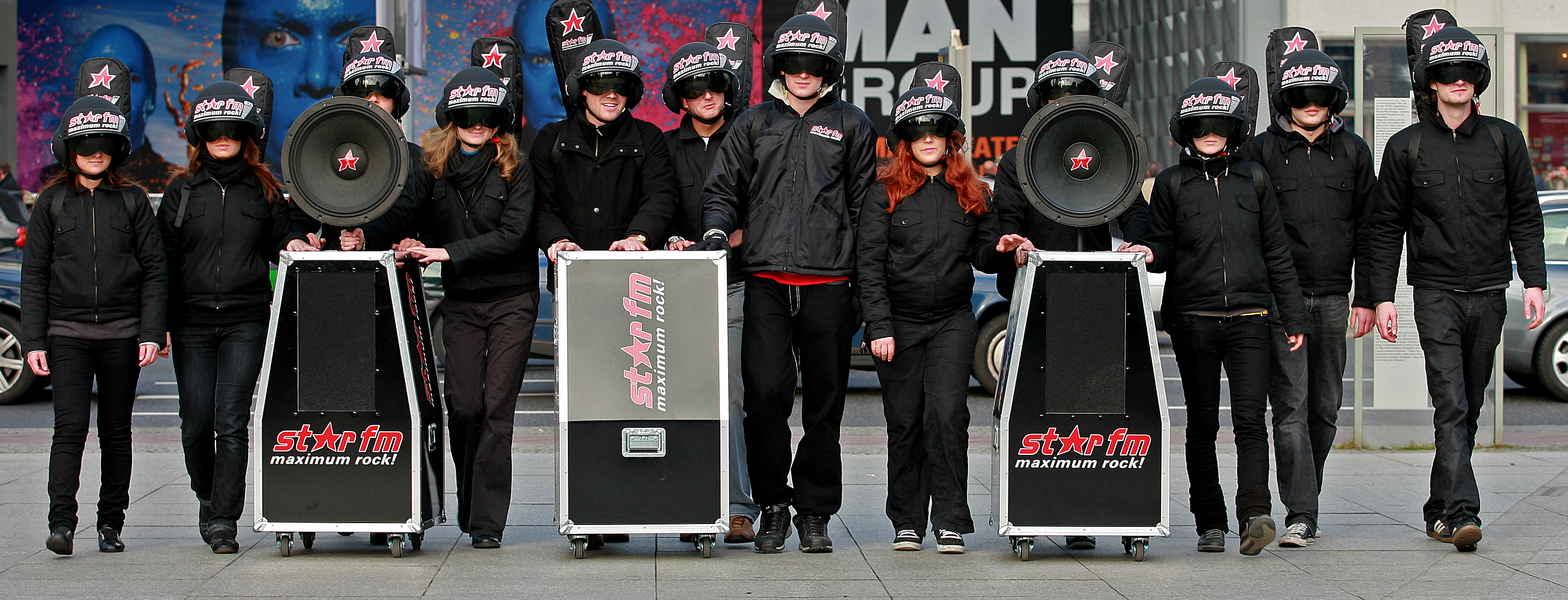 Werbefoto von Star FM